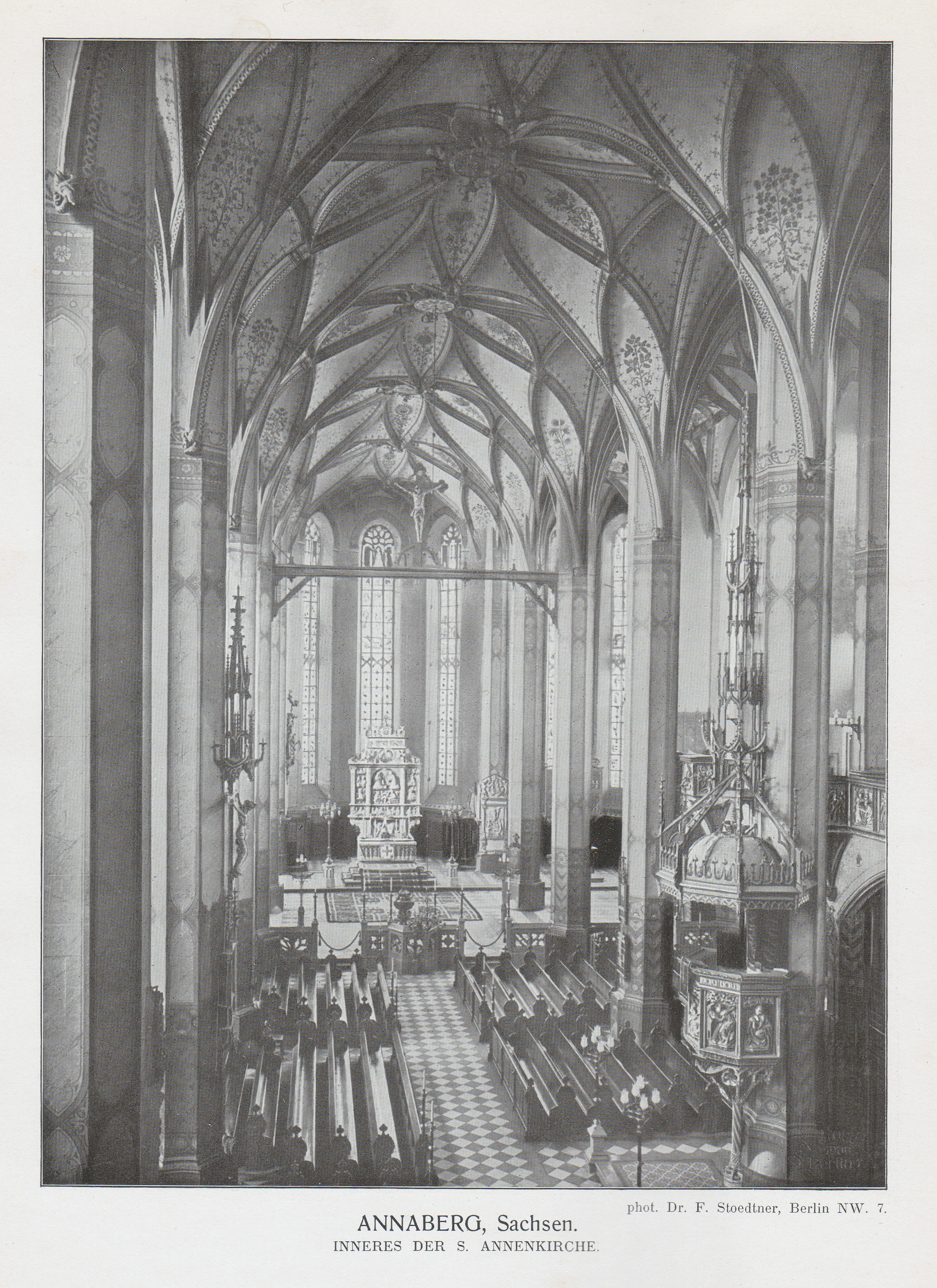 middenschip St. Annenkerk, Annaberg, in Saksen, rond 1900